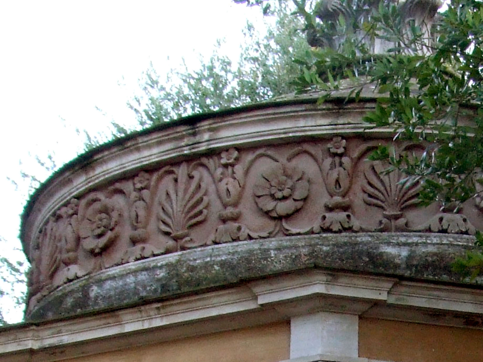 San Giovanni in Oleo, Oratorio a Roma, Dettaglio